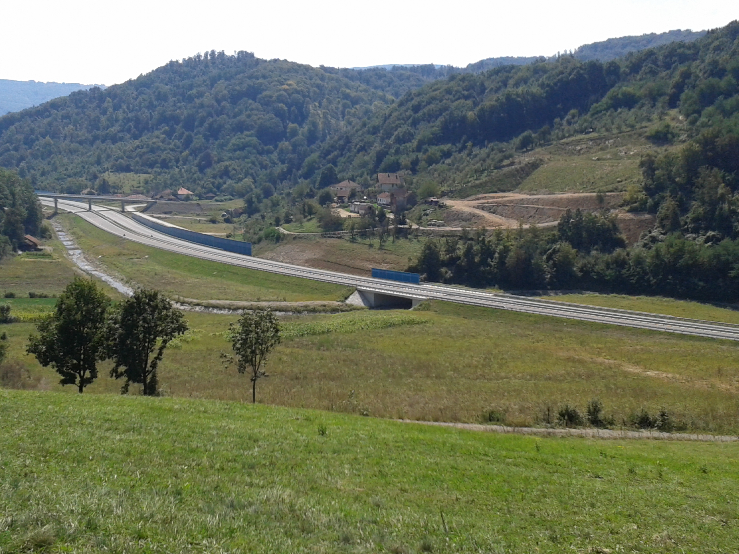 Koridor 11 deonica Ljig-Preljina